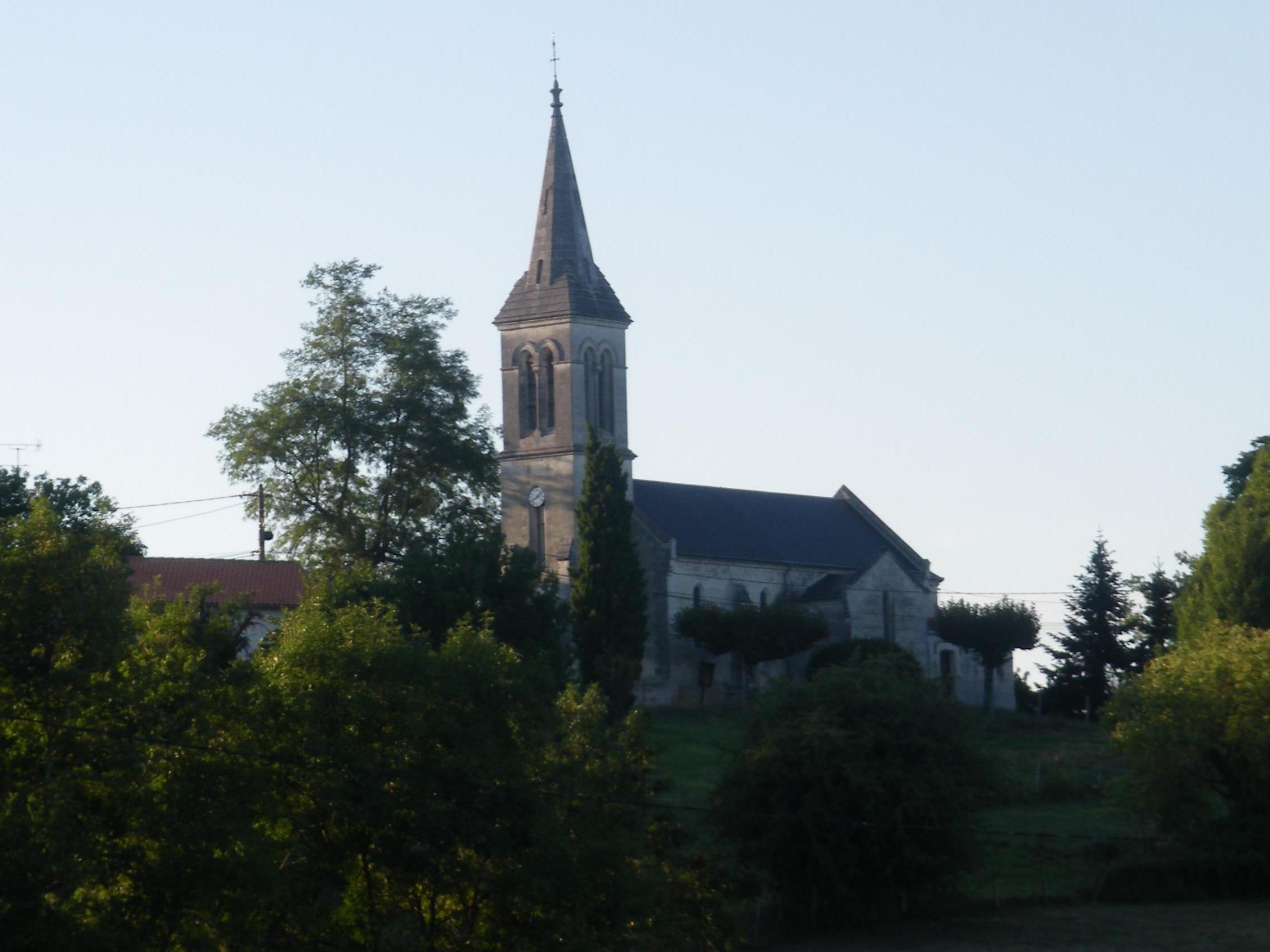 vue de l'eglise